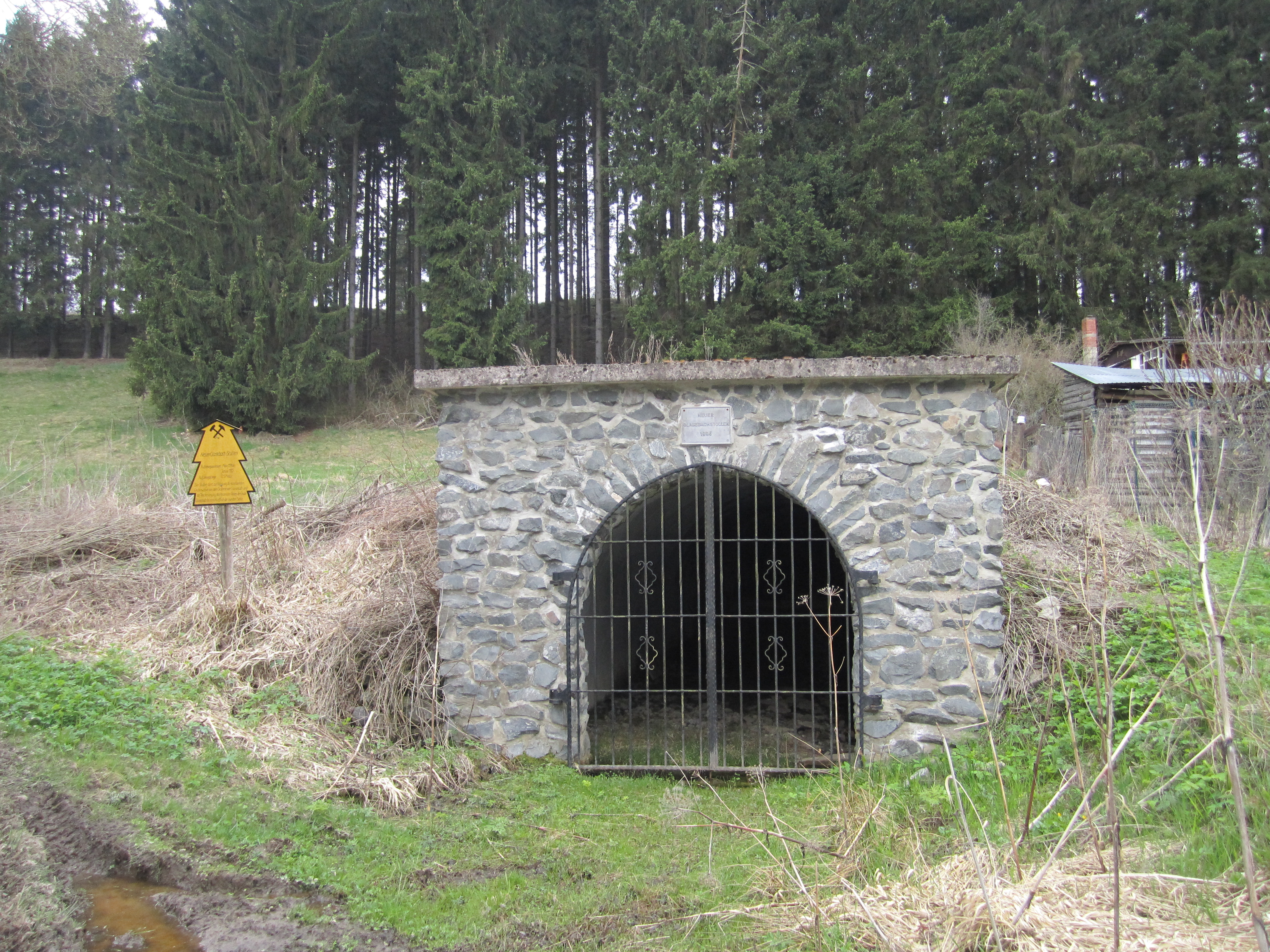 Das Mundloch des 1994 aufgefahrenen neuen Glasebachstollns.